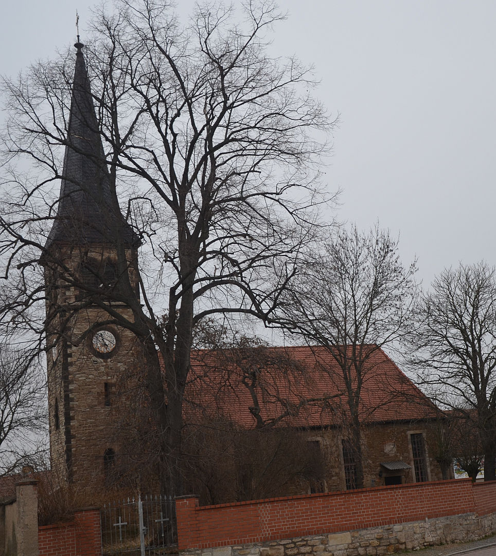 Kirche in Bothfeld